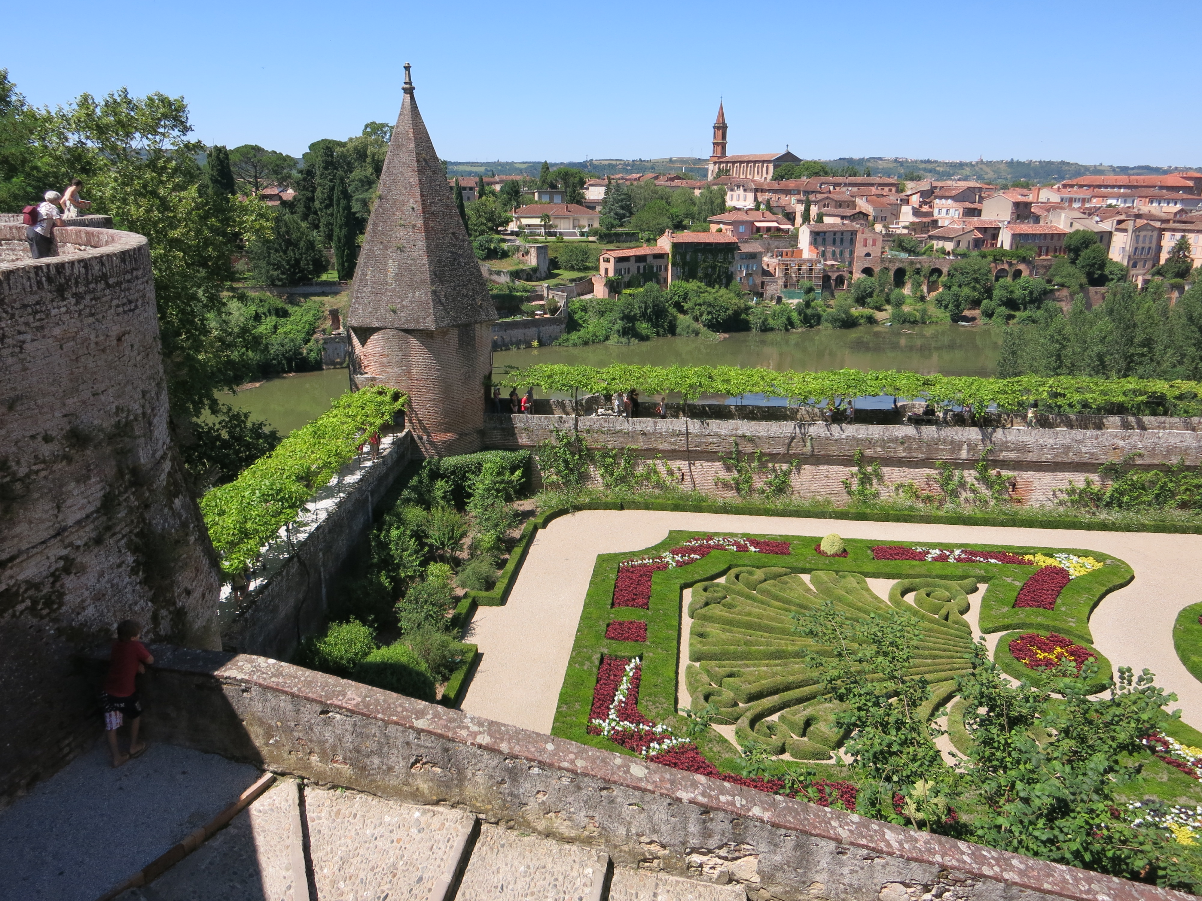 Le Jardin du Palais de la Berbie à Albi